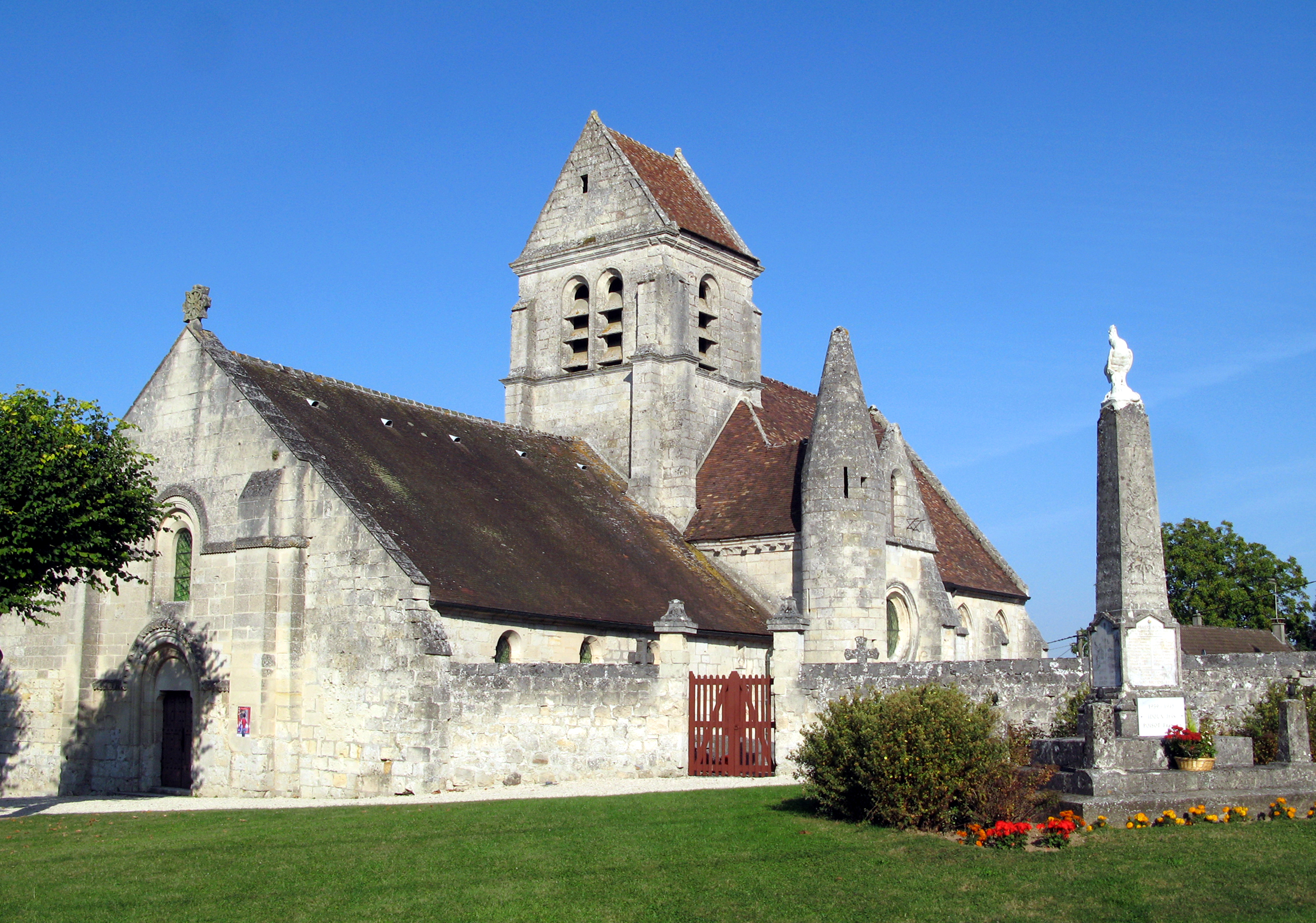 Villers-Hélon (Aisne, France) - L'église Saint-Martin et le monument-aux-morts. (Angle de prise de vue délibérément choisi pour mettre en parallèle la curieuse tourelle d'escalier de l'église et le monument-aux-morts et les faire paraître de dimensions égales, artificiellement, par le jeu de la perspective.) .